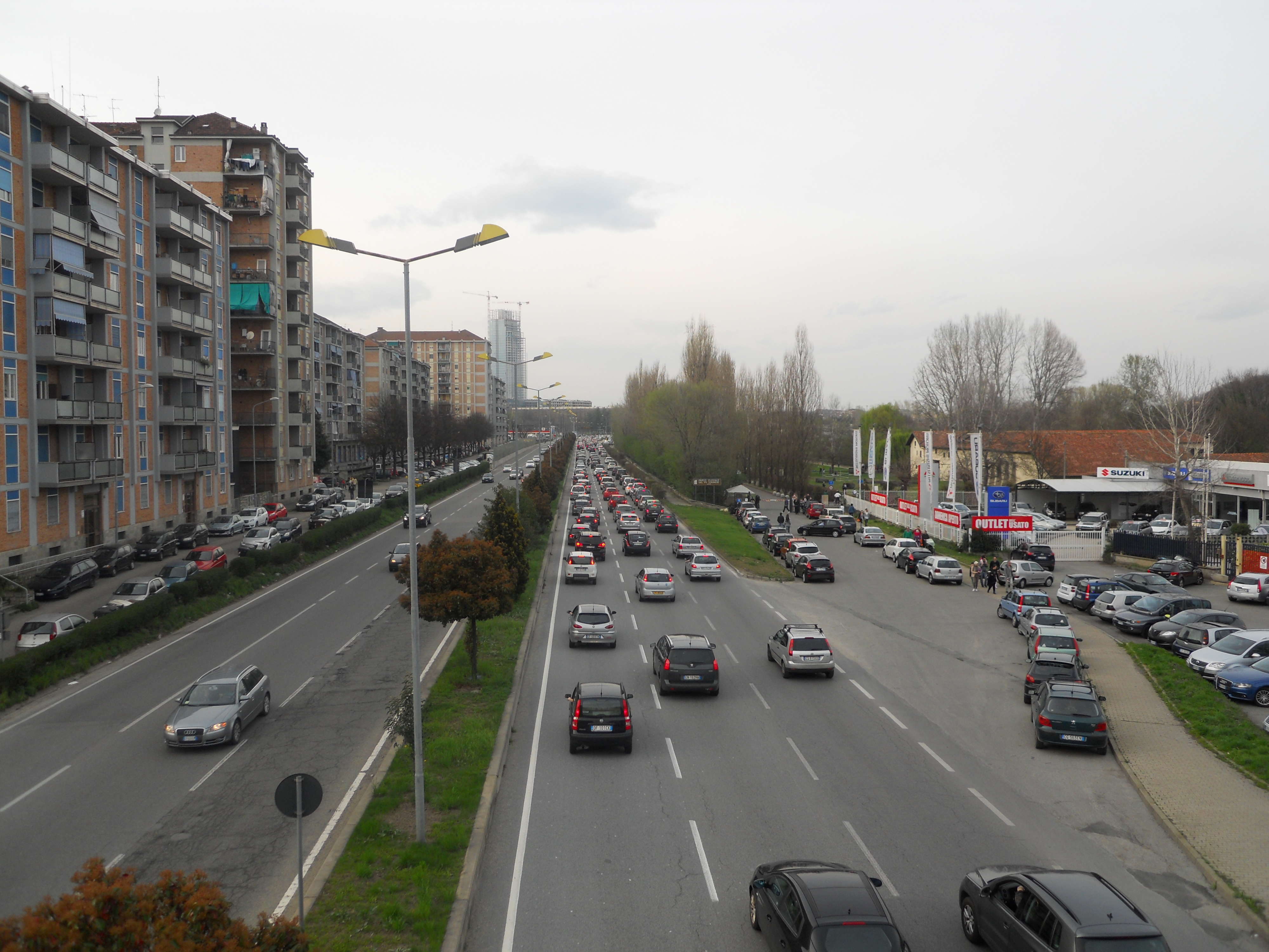 Panoramica sul traffico di Corso Unità d'Italia